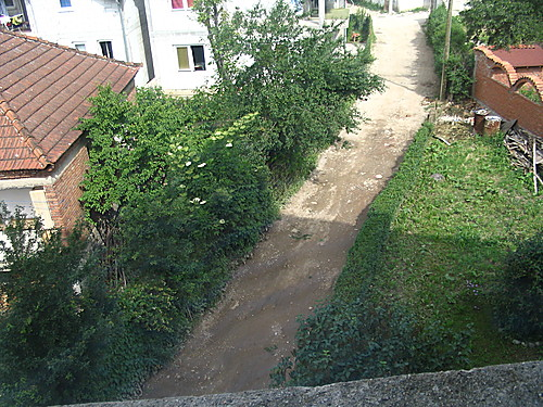 Старо корито Неродимке